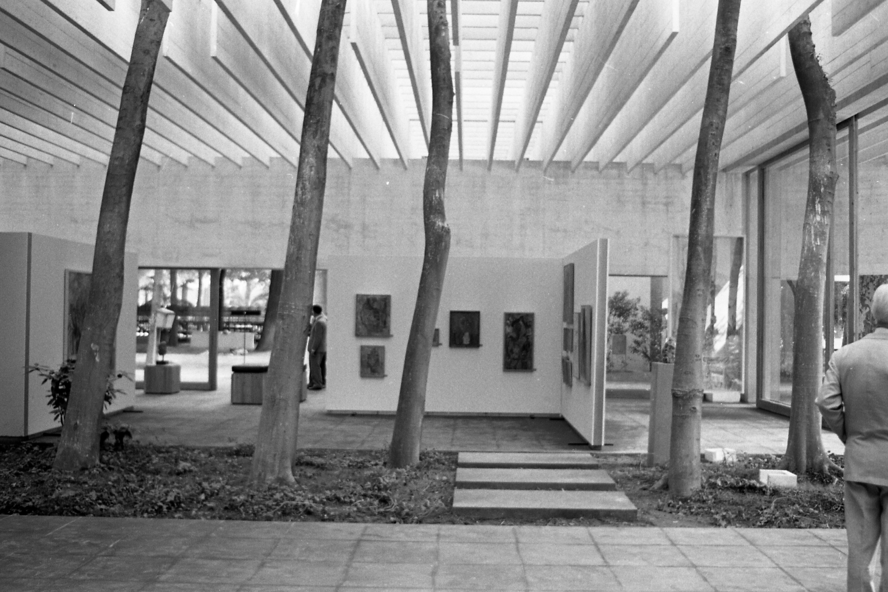 Servizio fotografico : Venezia, 1962 / Paolo Monti. - Strisce: 6, Fotogrammi complessivi: 37 : Negativo b/n, gelatina bromuro d'argento/ pellicola ; 35 mm. - ((I fotogrammi hanno una doppia numerazione. . - Sul portanegativi: Leica Plus X. - Sul dorso del portanegativi Monti specifica: "Padiglione Giappone; Padiglione Nazioni nordiche; Mostra scultore Mascherini; Mostra A. Martini; Mostra U. Milani". - Nell'agenda di lavoro citata in fonti e documenti Monti specifica: "1/5 interno padiglione giapponese; 6/13 padiglione paesi nordici; 15/19 sala Umberto Milani; 20/23 mostra commemorativa scultore Martini;M 24/36 sculture Mascherini; 37 quadro Giacometti". - Occasione: Documentazione della Biennale di Venezia del 1962. - Fonte: Agenda di Paolo Monti: Foto Leica 1 / 1-51 verde, 1-110 nera (1958-1963), presso Archivio Paolo Monti